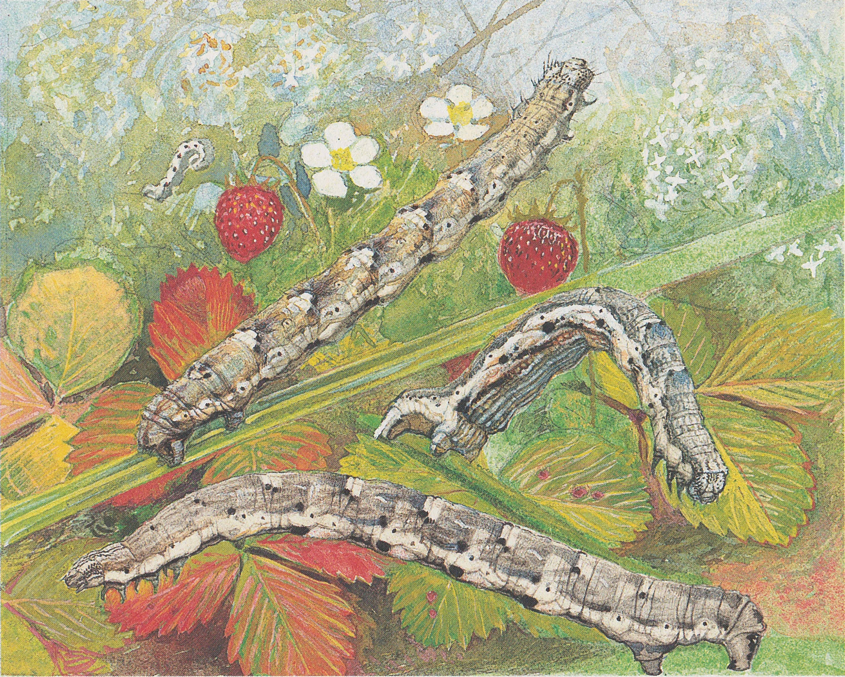 Raupen des Tuffsteinspanners (Coenotephria tophaceata, früher Nebula tophaceata) auf Erdbeerblättern